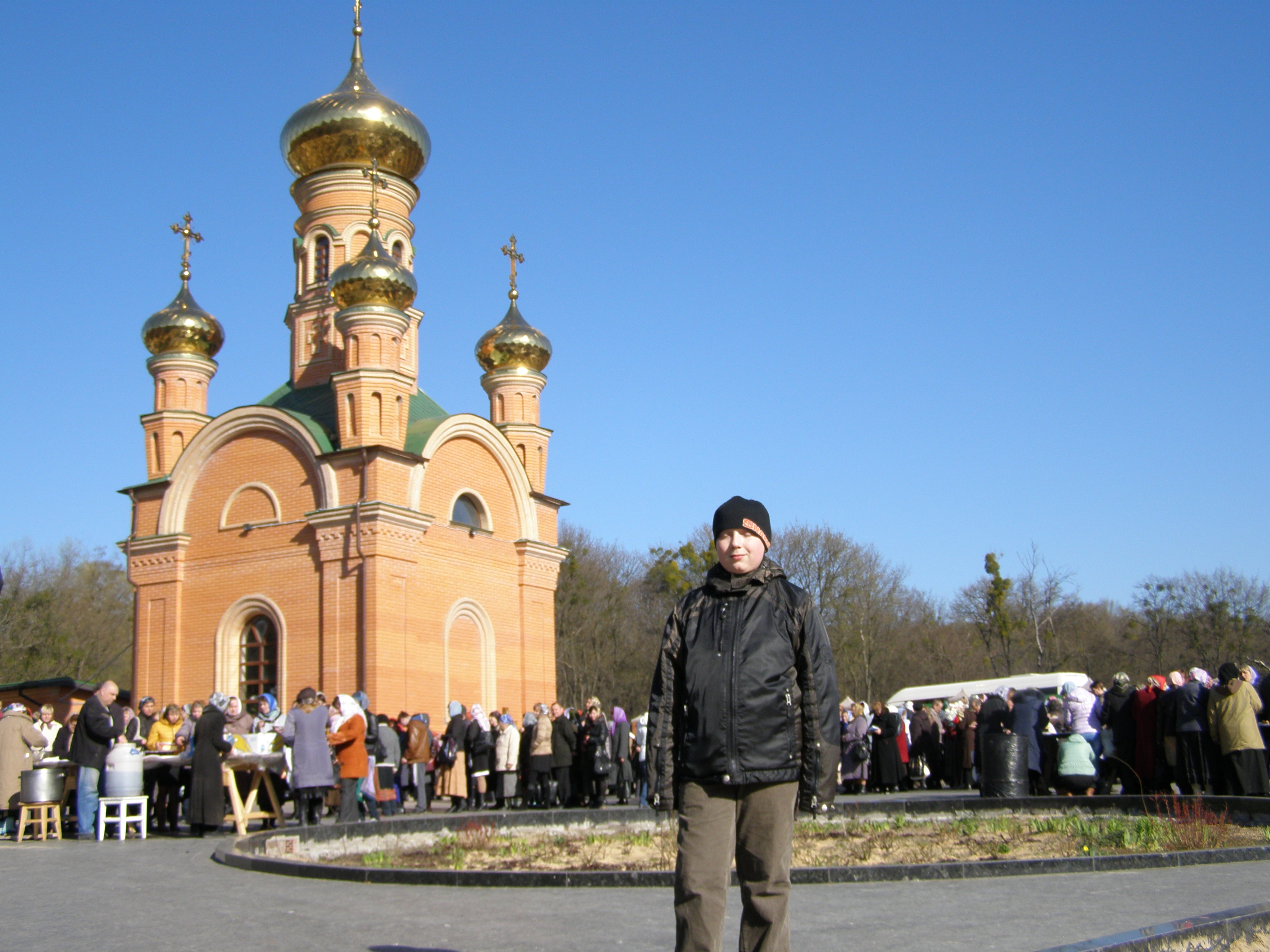 Голосіївська Свято-Покровська пустинь, Київ, Затєвахіна Полковника вул., 14